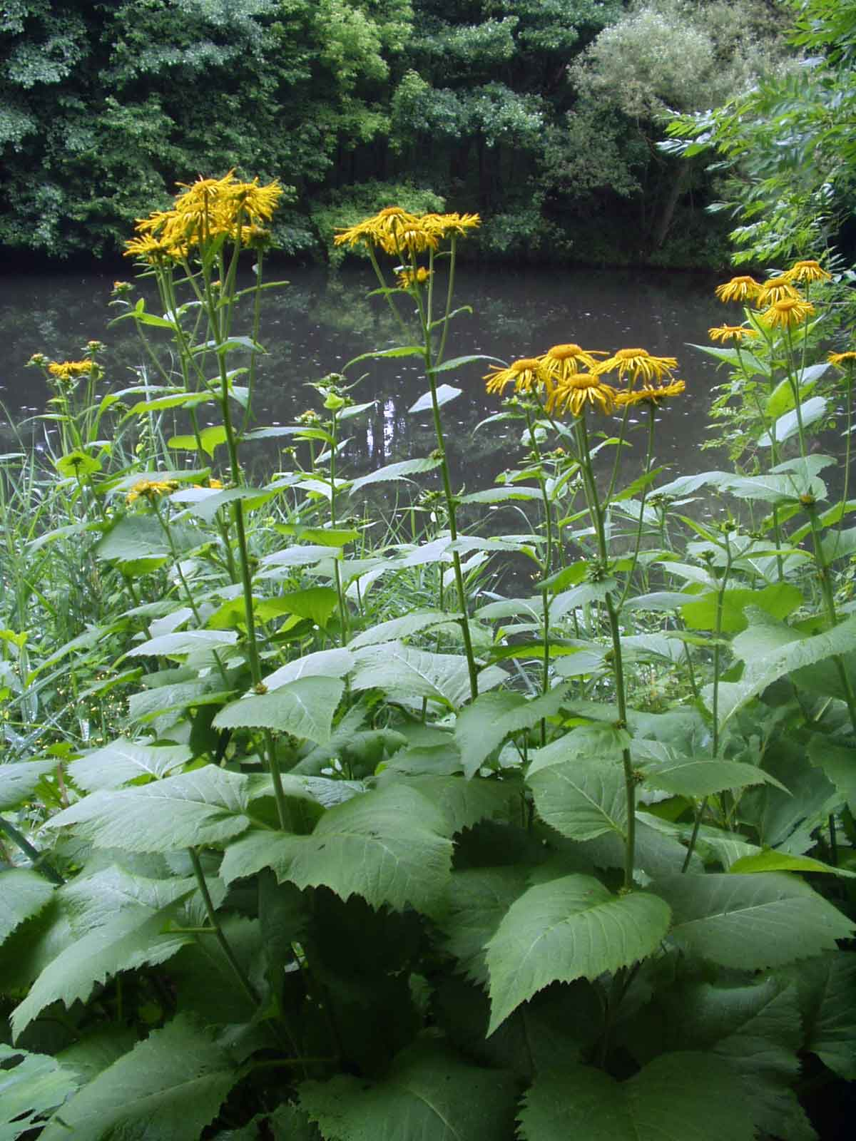 Große Telekie (Telekia speciosa)